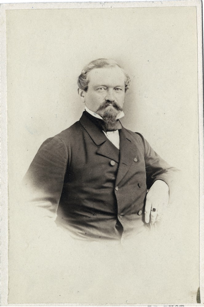 Majoren och Ingenjören Nils Fredrik Frykholm (1823-1873). Avporträtterad 1869 för Statens Jernvägars matrikel. Fotograf är troligen C A Brunstedt i Stockholm.